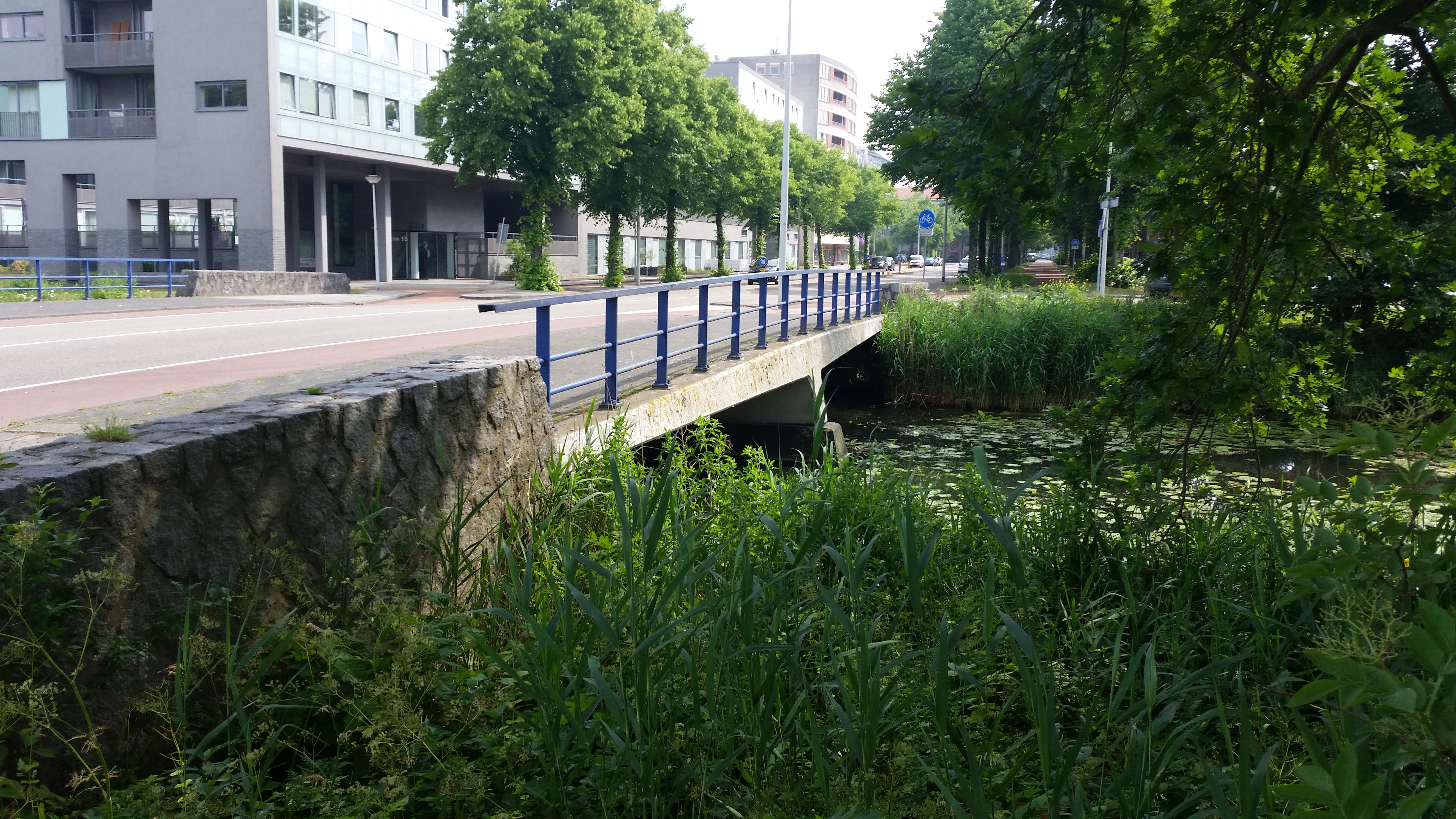 Brug 638, Cornelis Outshoornstraat, overspanning